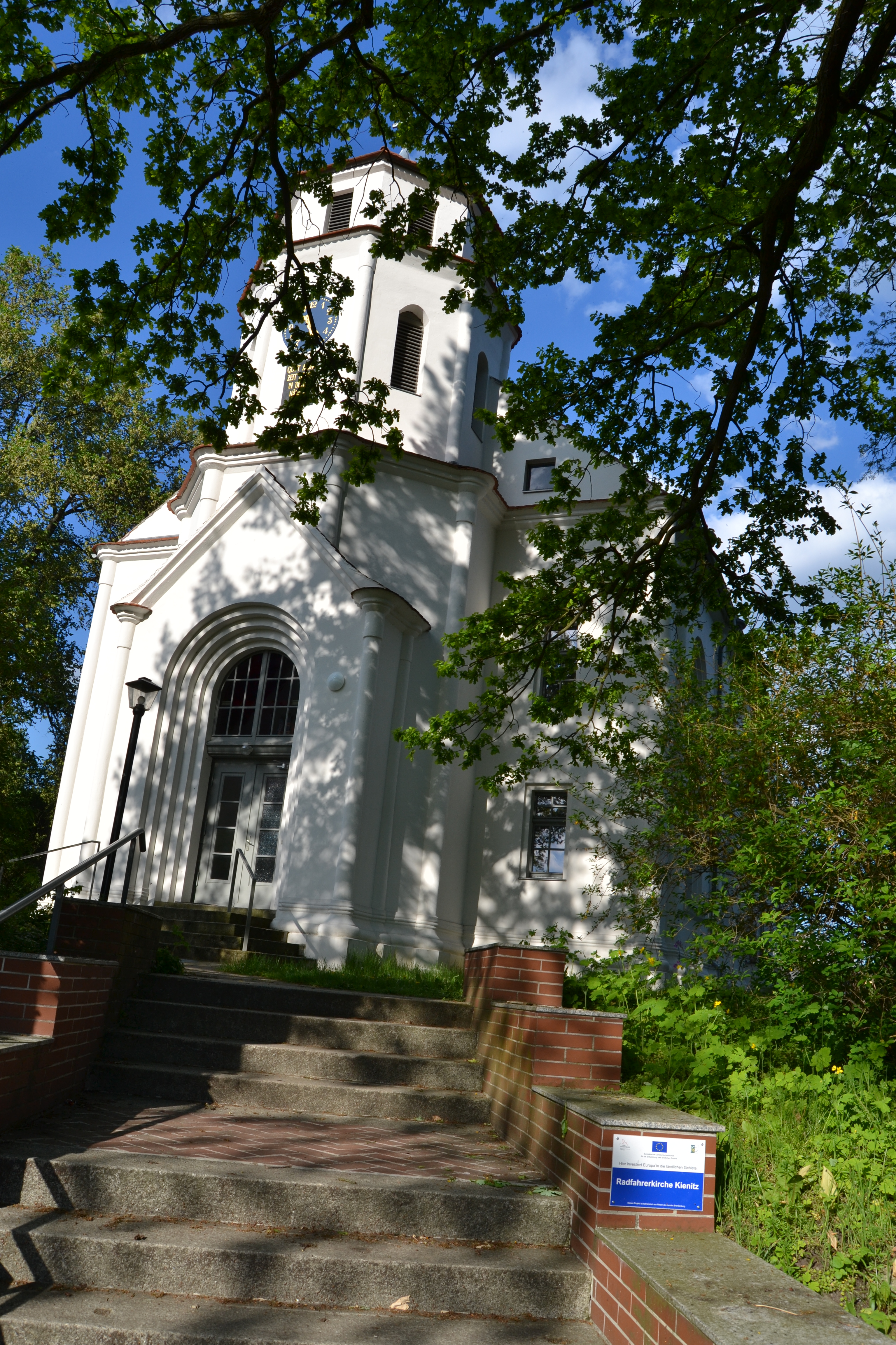 Fotoprojekt – Zwischen Berlin und Oder 2014 Photo project “Between Berlin and River Oder 2014” Baudenkmal Redwegkirche Kienitz, Gemeinde Letschin.